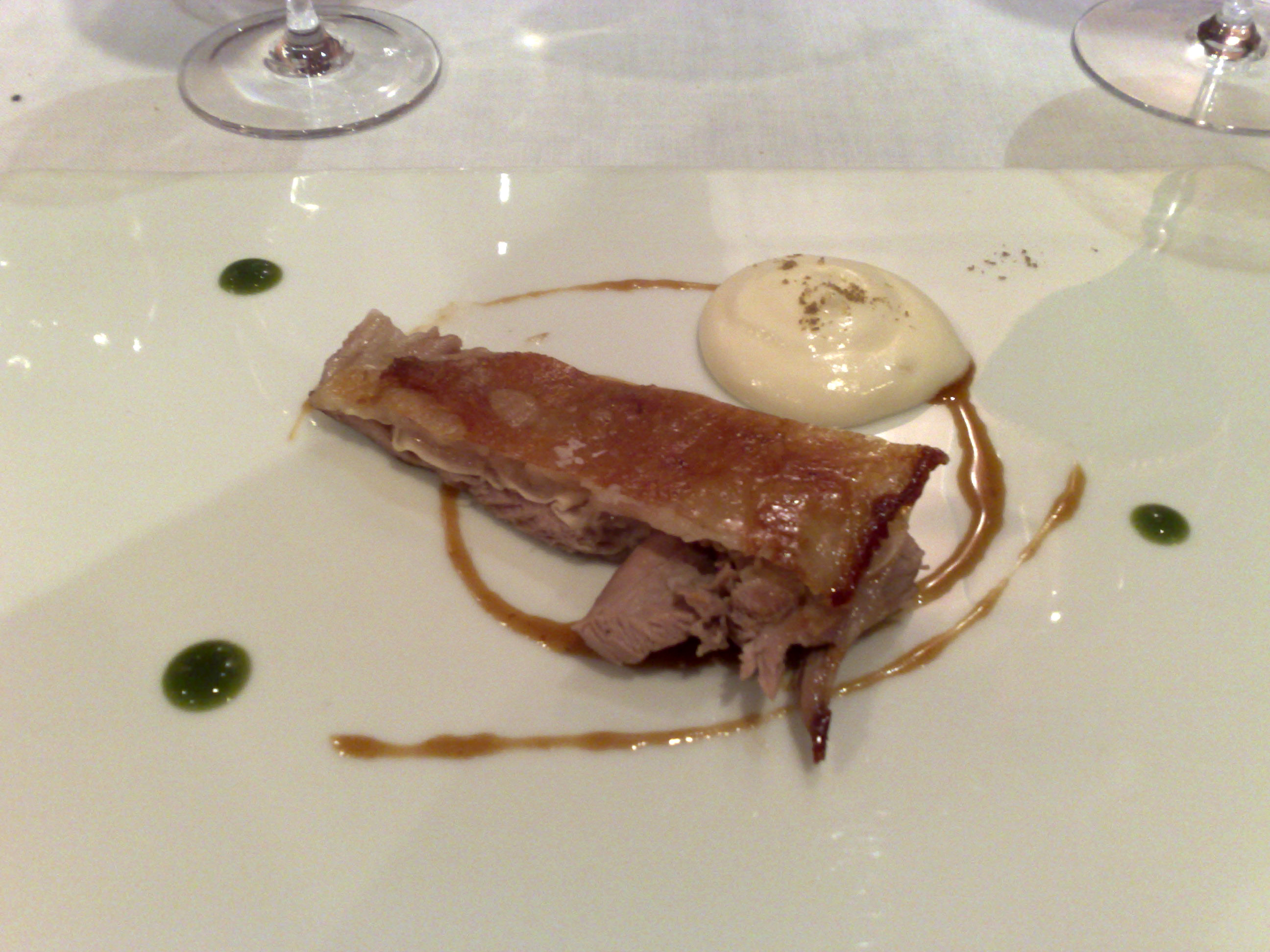 A course at El Celler de Can Roca.